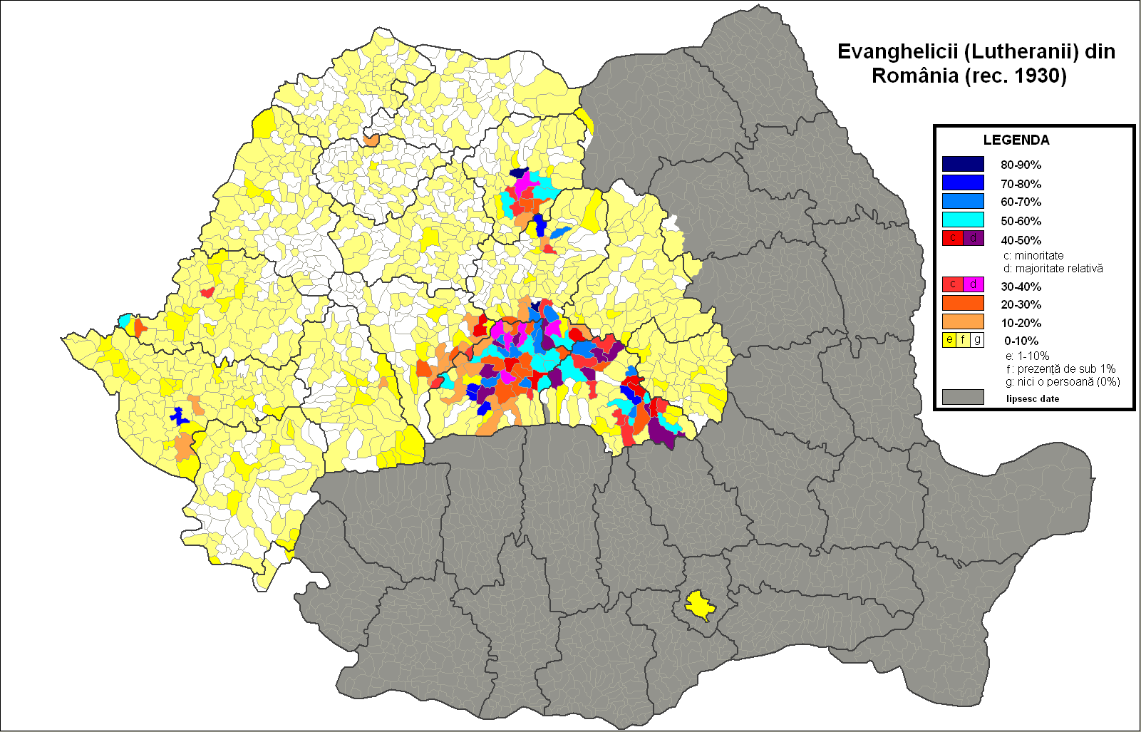 Distibuţia evanghelicilor lutherani în România conform recensământului din 1930. Harta reprezintă frontierele actuale, precum şi limitele administrative actuale: judeţe, comune, oraşe. Nu sunt reprezentate în hartă evanghelicii lutherani din Bucovina şi Drobrogea, care alcătuiau o parte din populaţia germană din aceste regiuni.